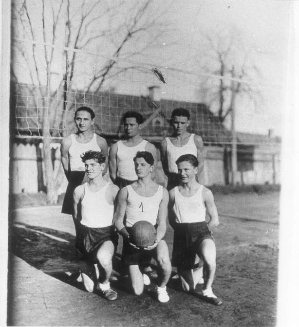 Беларуская (тарашкевіца): Валейбольная каманда пружанскай гімназіі імя Адама Міцкевіча